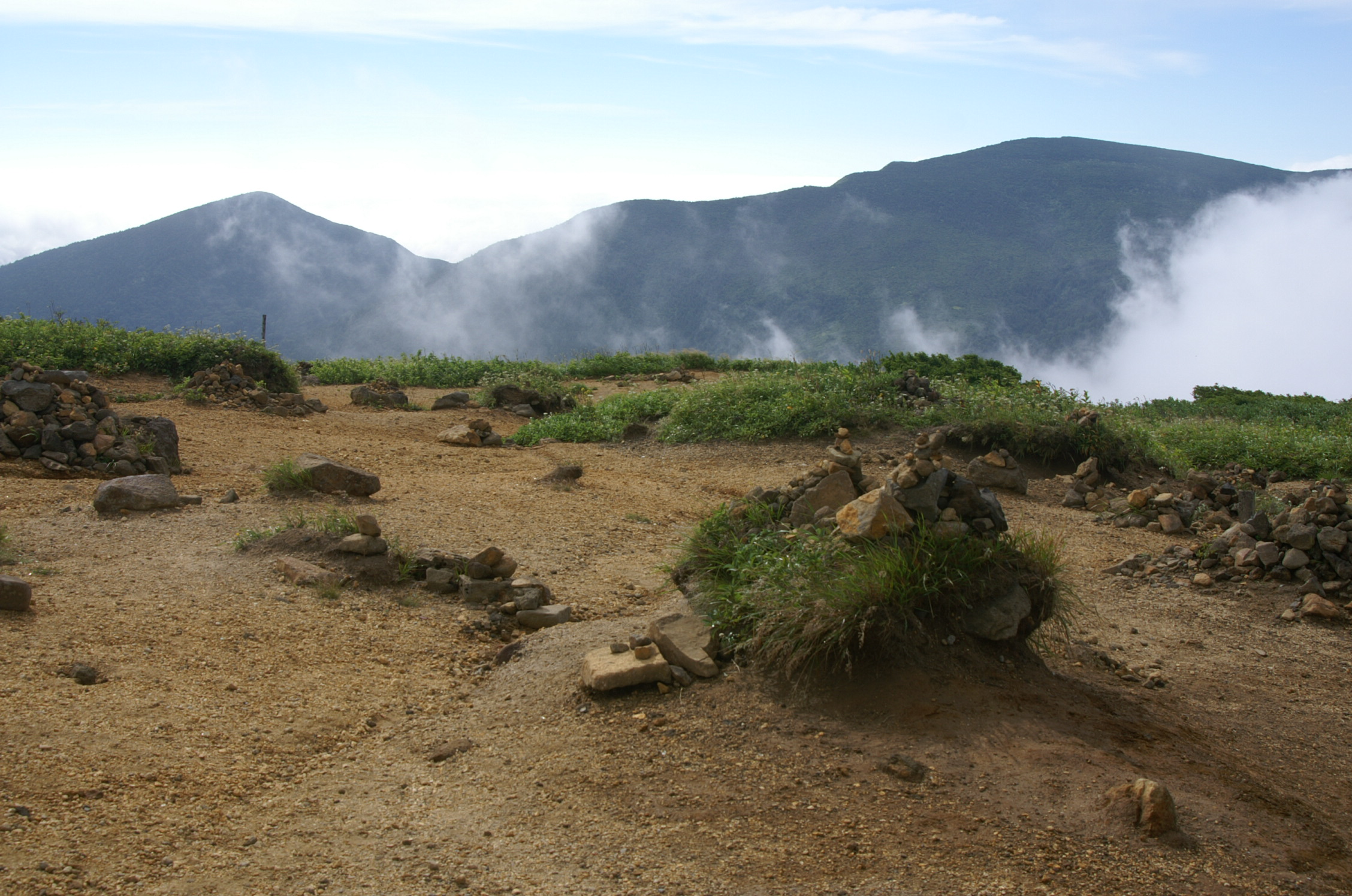 刈田岳から見た屏風岳